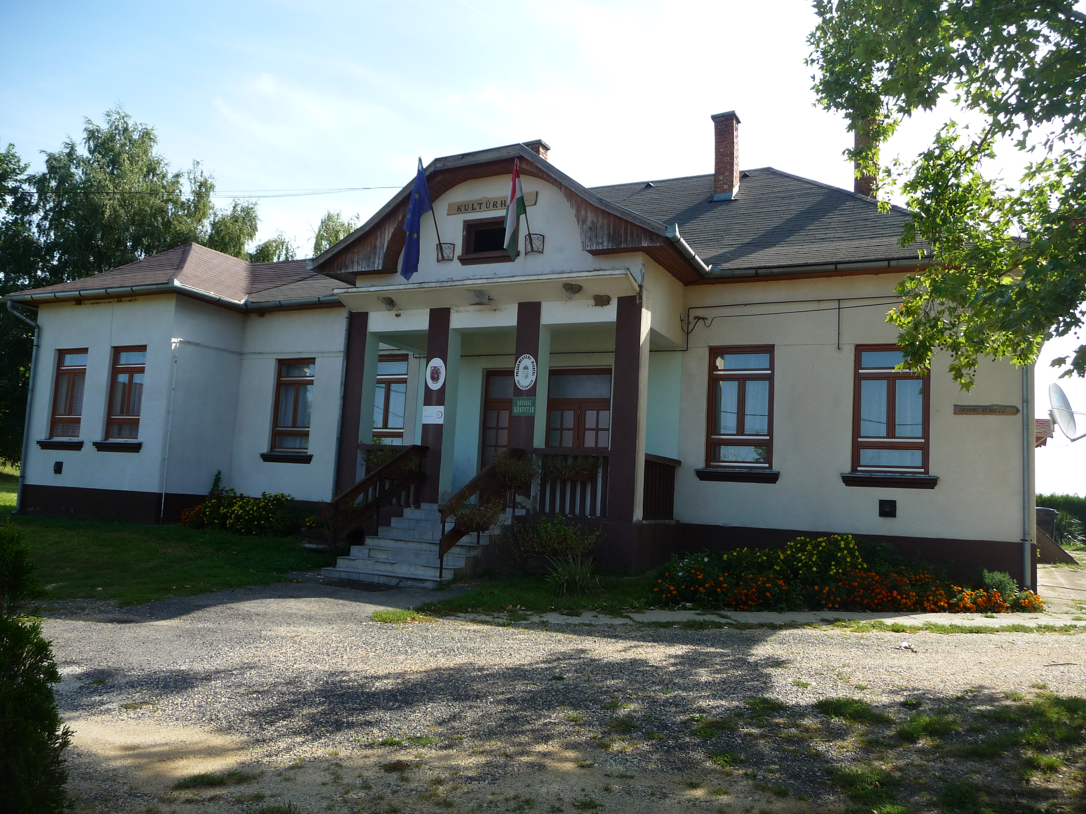 Polgármesteri hivatal, könyvtár és kultúrház, Felsőjánosfa